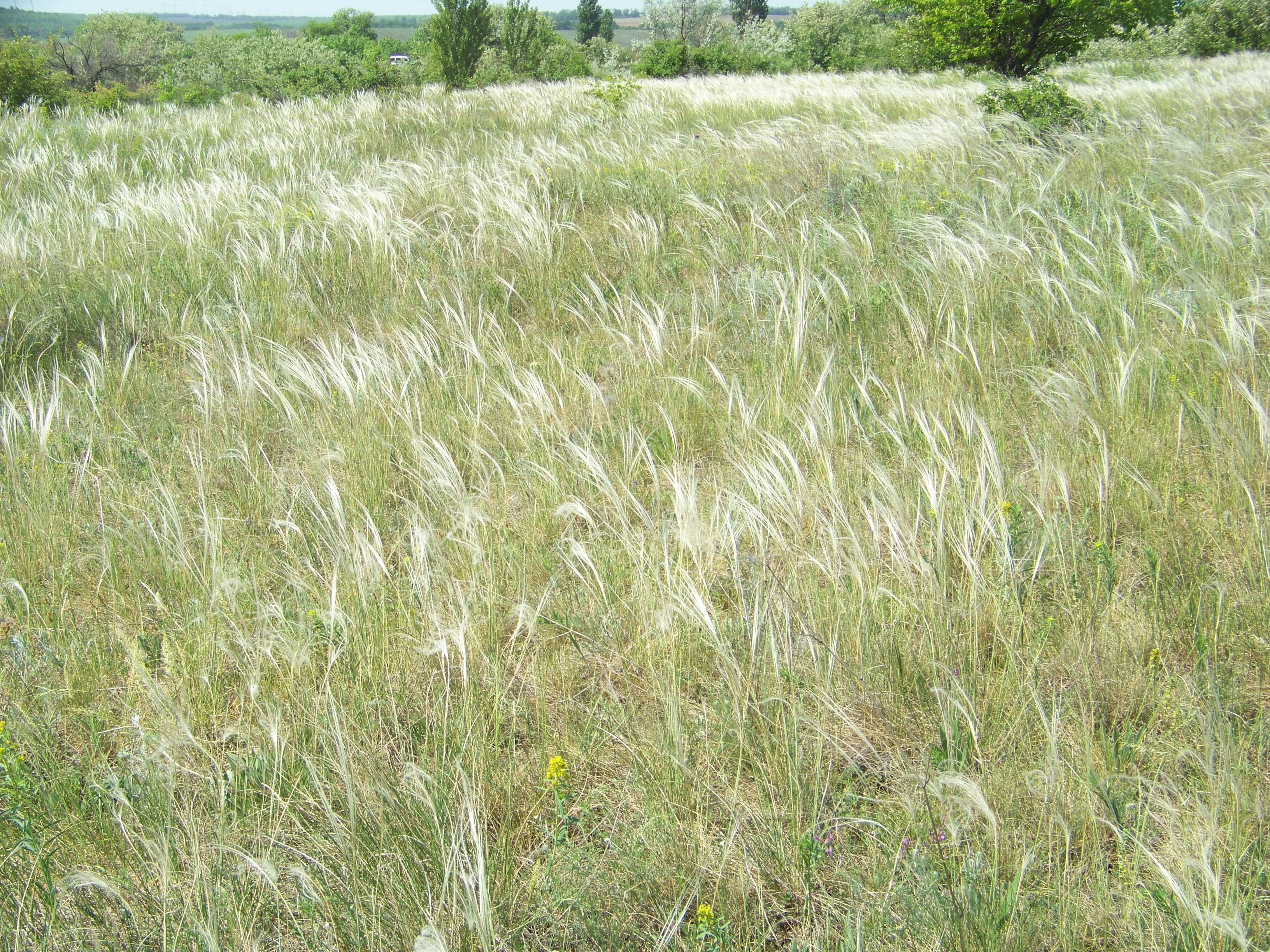 Ковила відмінна. Клебан-Бик, Костянтинівський район.